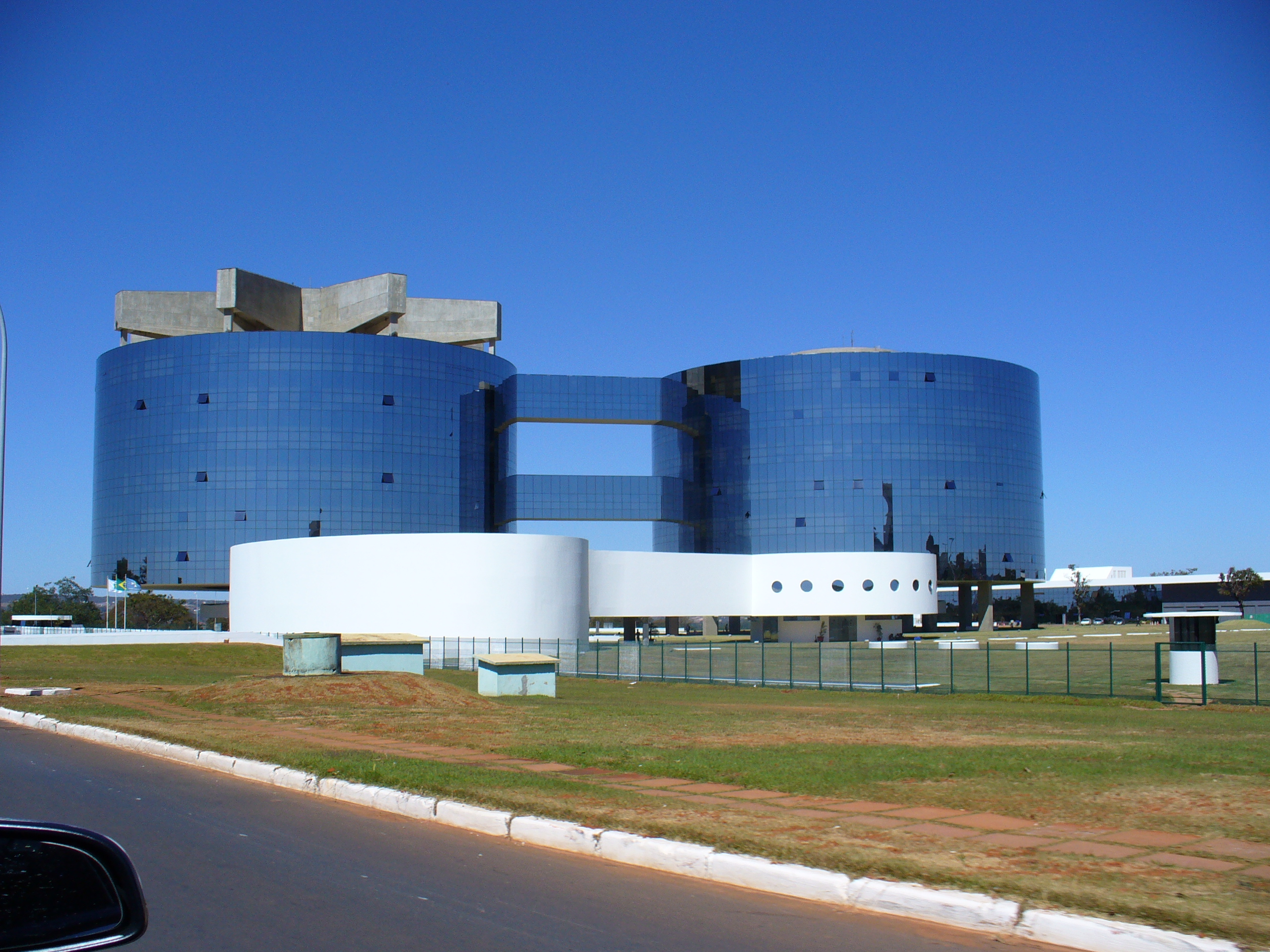 Edifício-sede da Procuradoria Geral da República, localizado em Brasília, nas coordenadas 15°48'27"S 47°51'34"W.